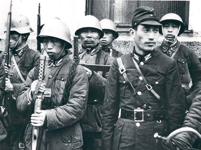 傀儡中国政府軍の将兵ら。